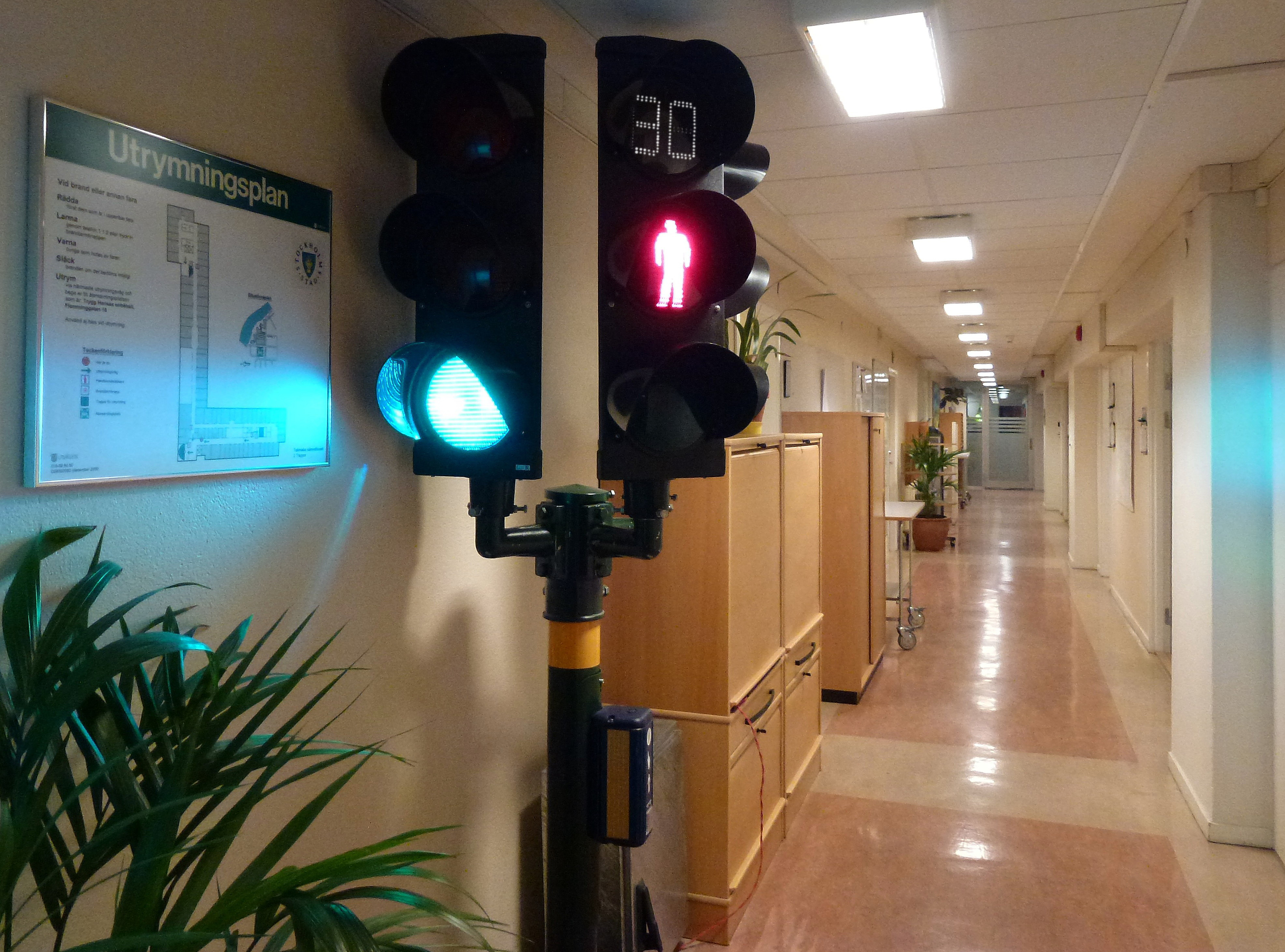 En trafiksignal med nedräkniningsfunktion för gående.